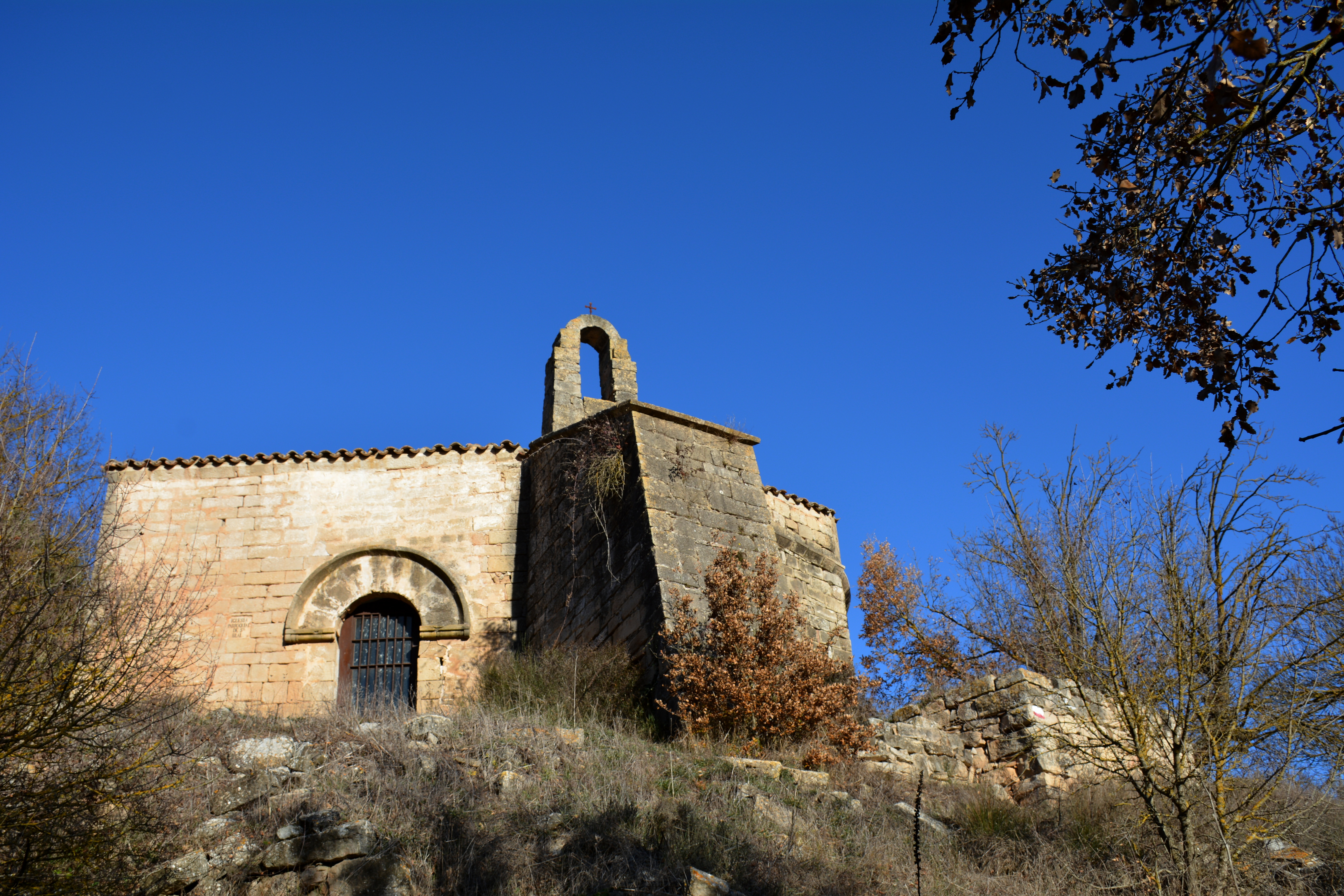 Sant Blai del Fonoll és una església del municipi de Passanant i Belltall (Conca de Barberà) inclosa en l'Inventari del Patrimoni Arquitectònic de Catalunya.